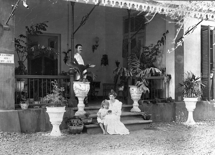 Foto. Het gezin Kunst op de voorgalerij van hun huis in Tjimahi, West-Java